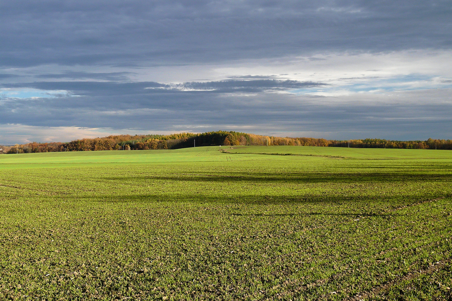 Návrší Čihadlo ze západu